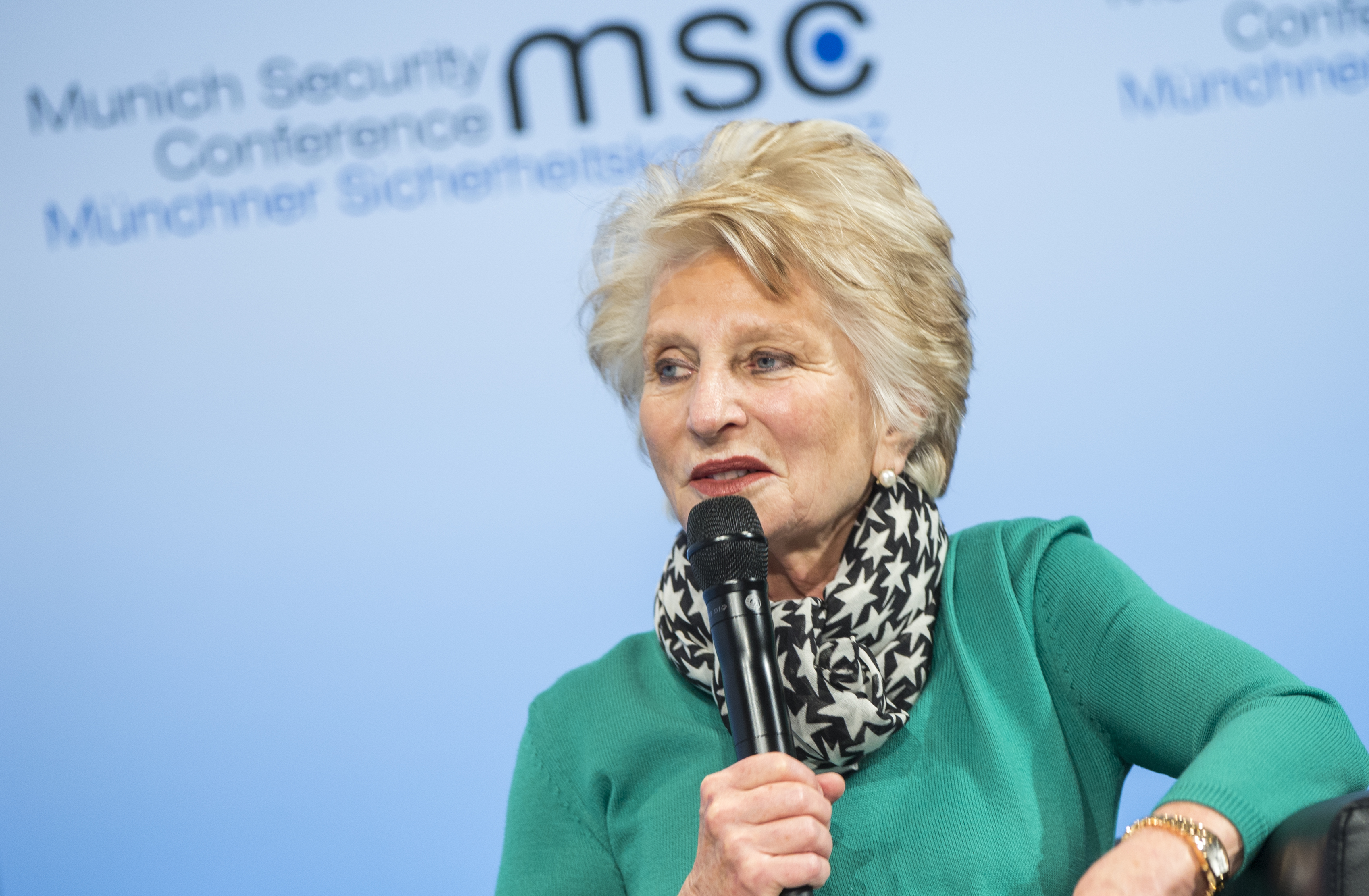 Jane Harman während der Münchner Sicherheitskonferenz 2017